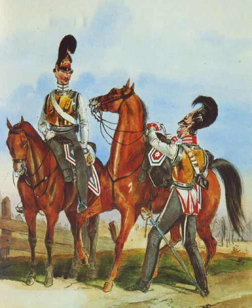 Garde Kürassier-Regiment (links) und Gardes du Corps (rechts) Preußen